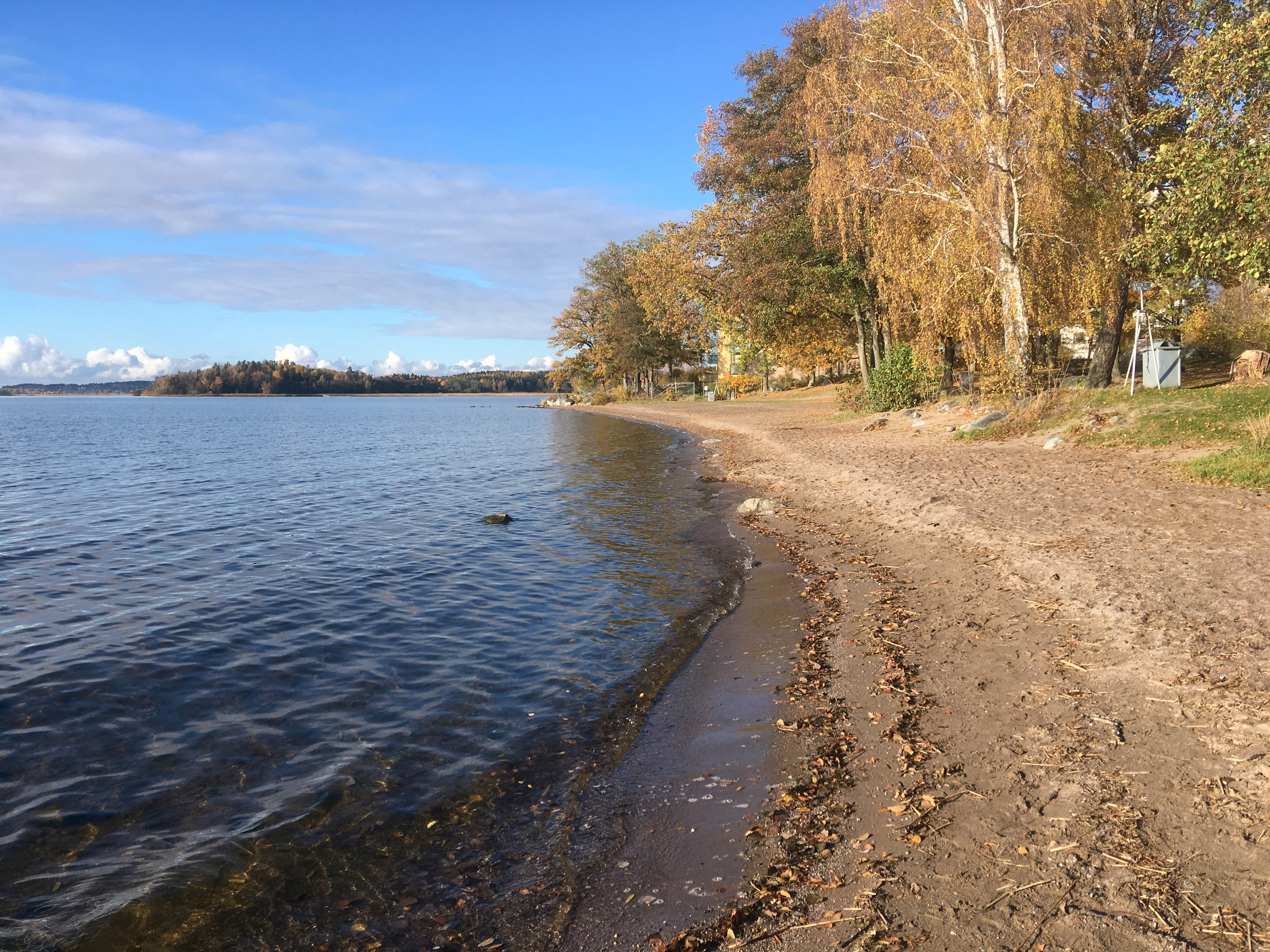 Kallhällsbadet